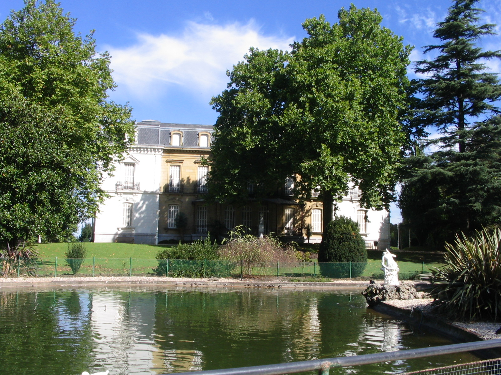 Fotografía del Parque y el Palacio de Ayete, en San Sebastián (España)